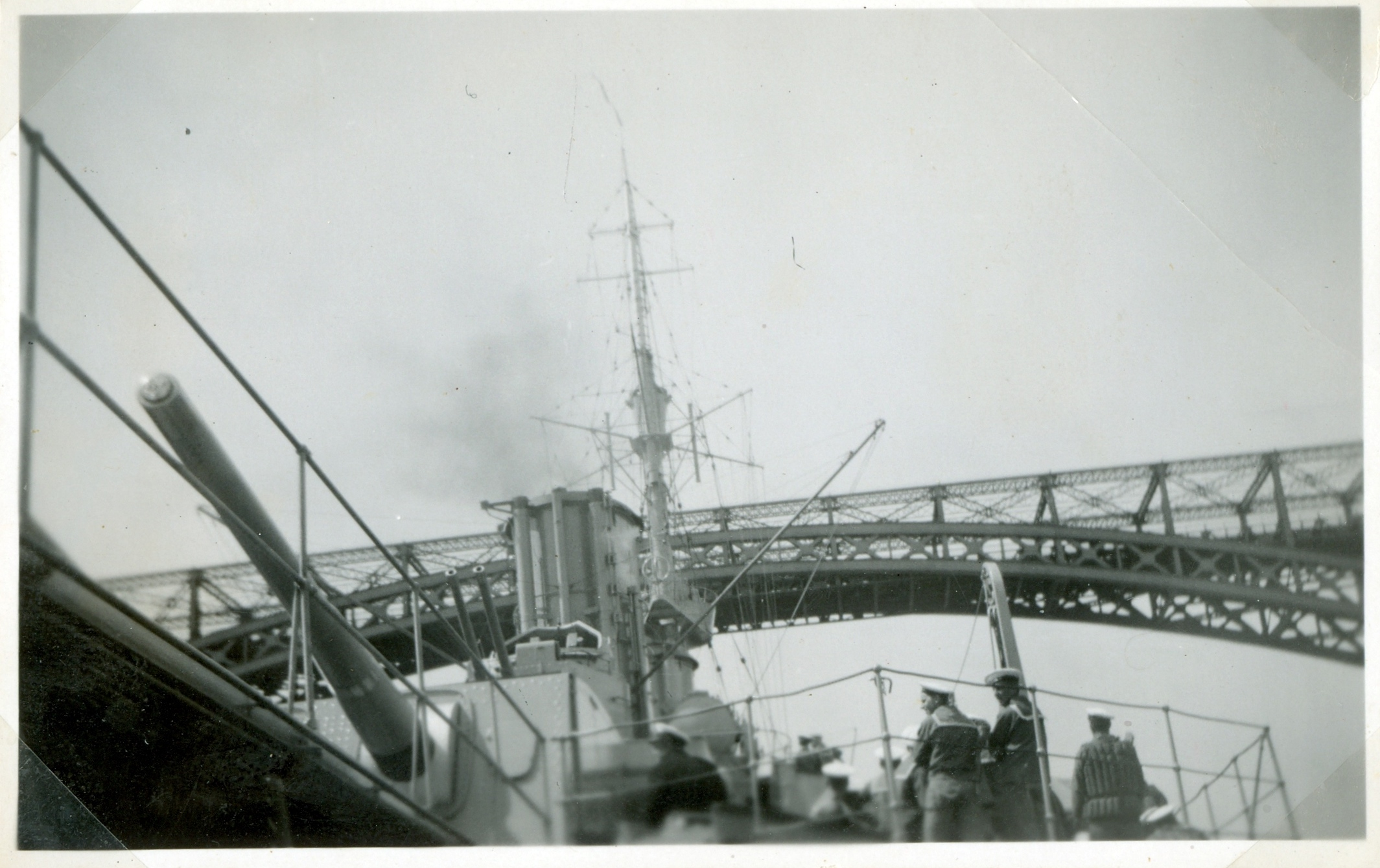 HMS Gotland passerar genom Kielkanalen under resan 1939. Foto: Lennart Håkansson